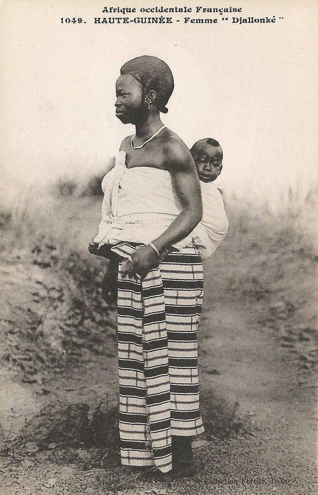 François-Edmond Fortier, Femme Djallonké. Afrique Occidentale Française. Haute-Guinée